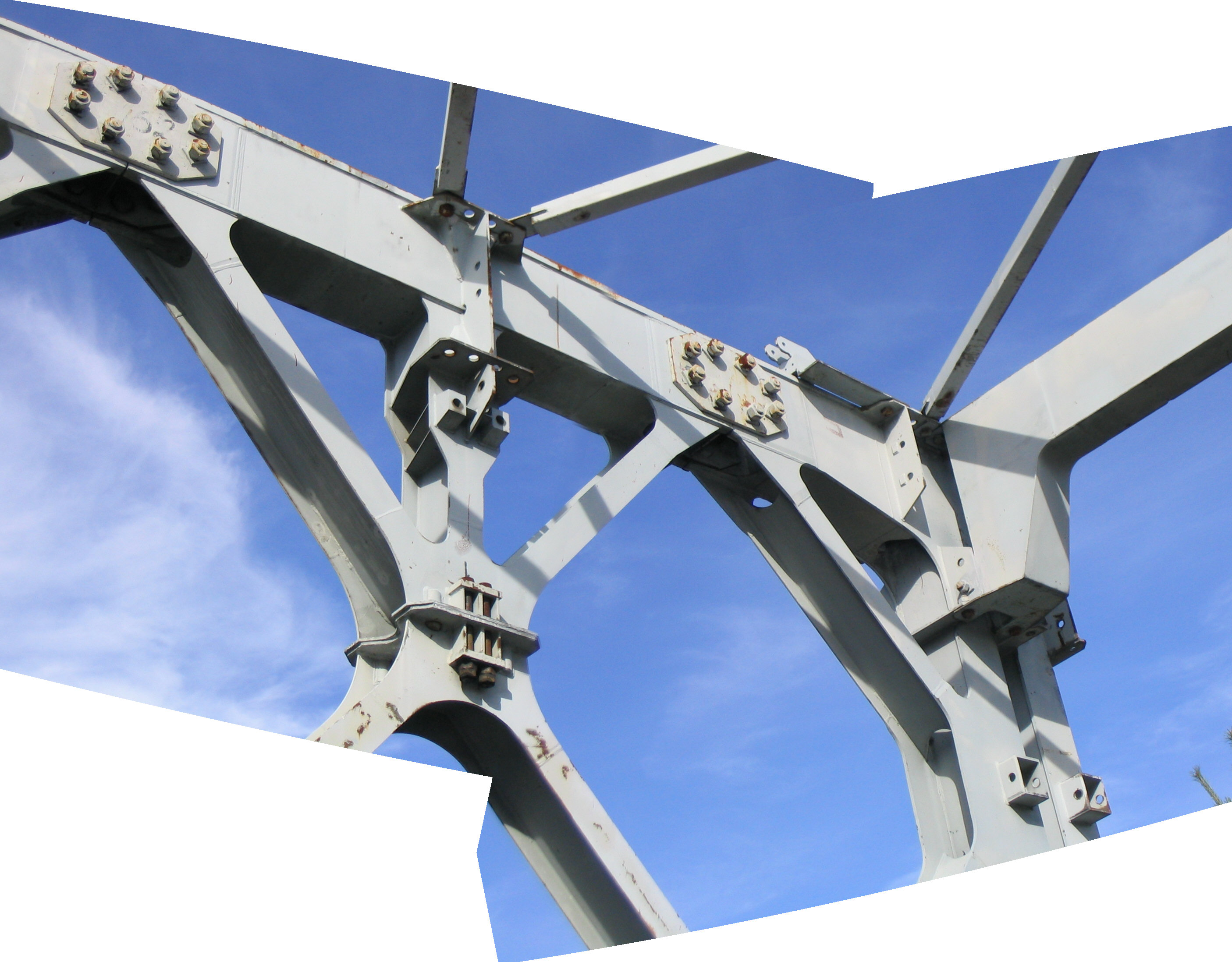 Nordöstliche Ecke der der Fachwerkkonstruktion im mittleren Bereich der seit 2010 unter Denkmalschutz stehenden Klinkerhafenbrücke. Bild ist aus 2 Einzelaufnahmen aus dem Jahr 2004 zusammen gesetzt